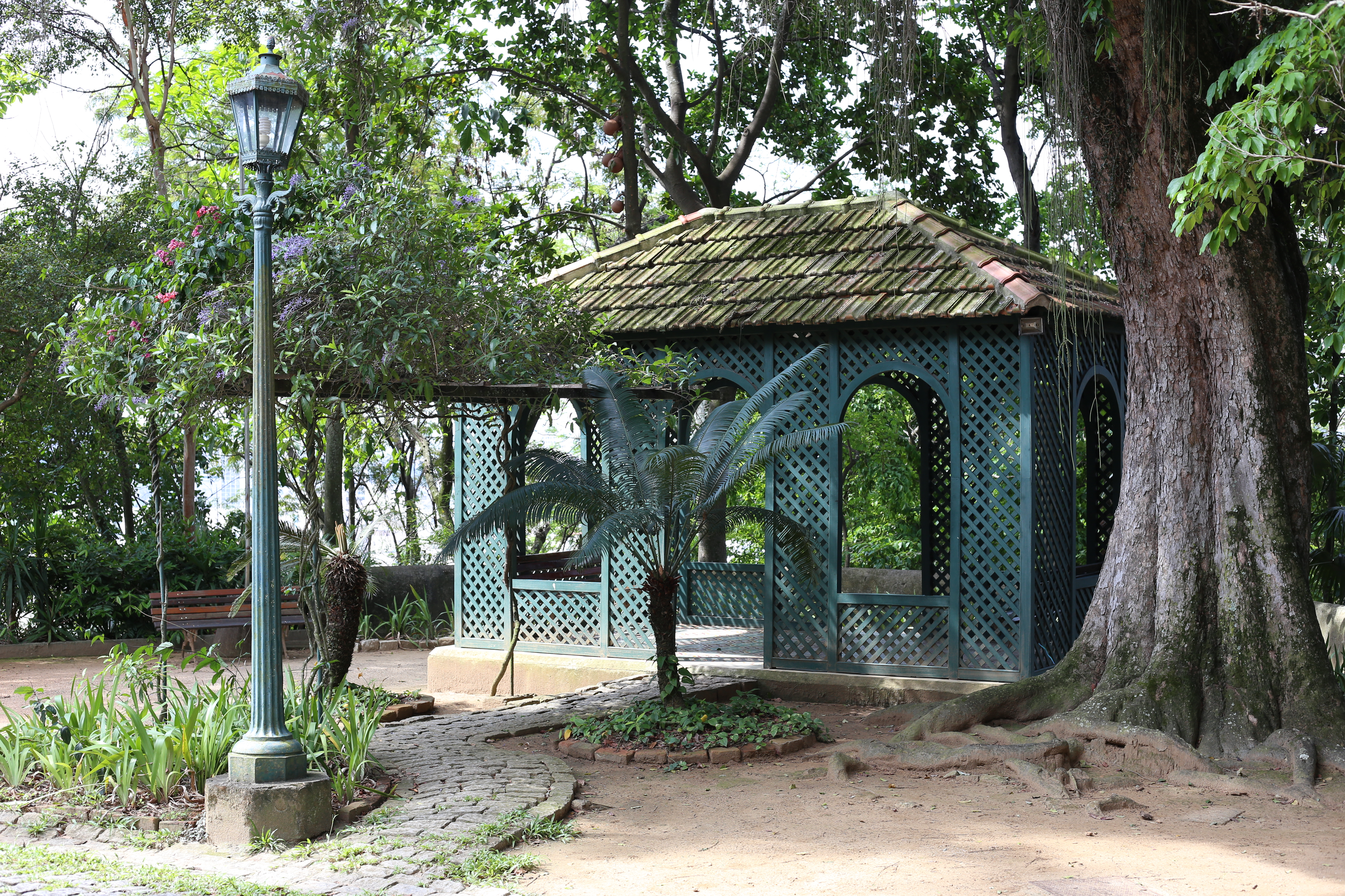 Caramanchão em ferro com trepadeiras, edificação de madeira e telhas de barro. Piso de ladrilho hidráulico. Museu Casa de Benjamin Constant, Rio de Janeiro.